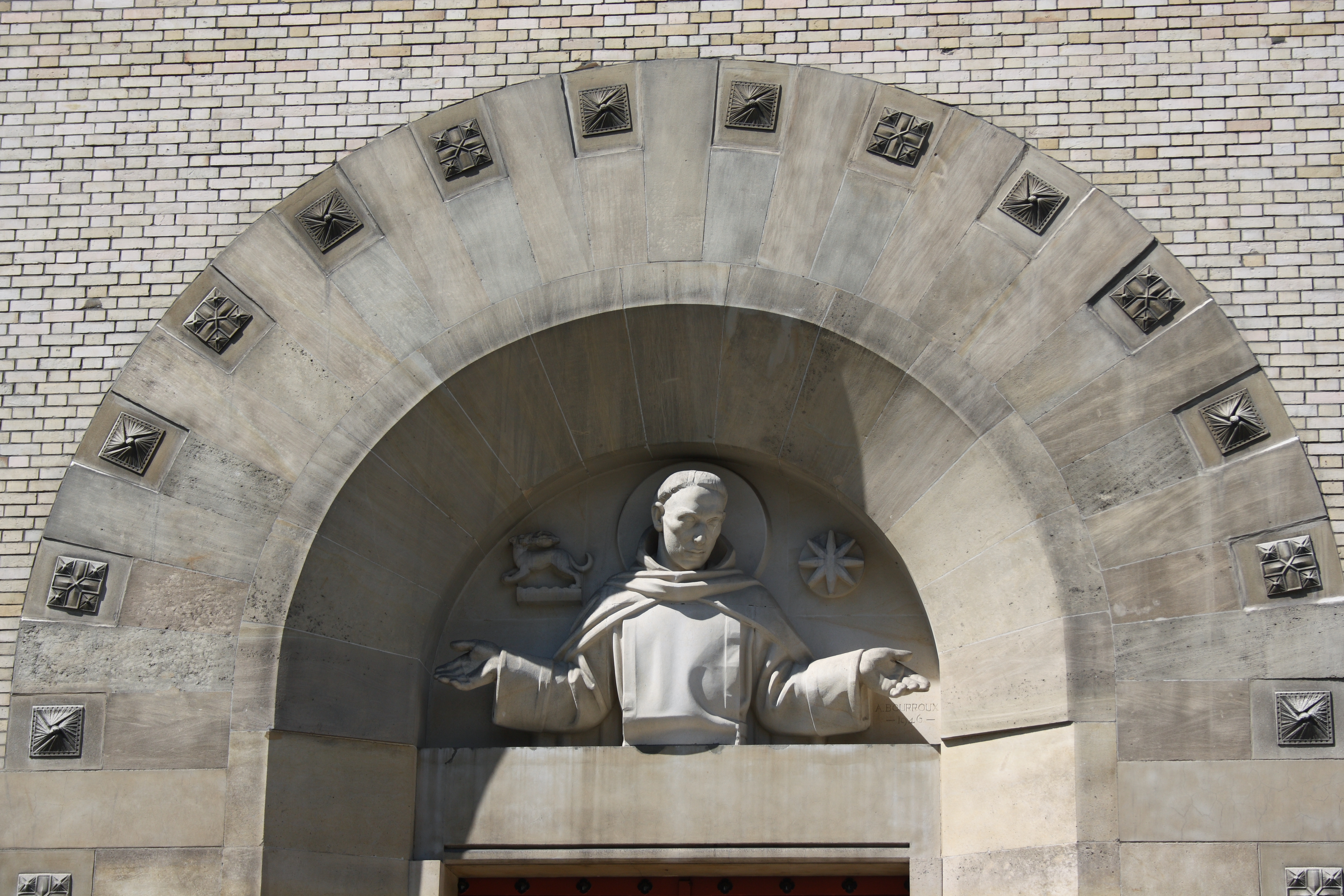 Katholische Pfarrkirche Saint-Dominique, 16, rue de la Tombe-Issoire im 14. Arrondissement von Paris, 1913-1921 von Georges Gaudibert errichtet; im Tympanon Büste des hl. Dominikus, links Hund mit Fackel, rechts Stern, von André Bourroux von 1946